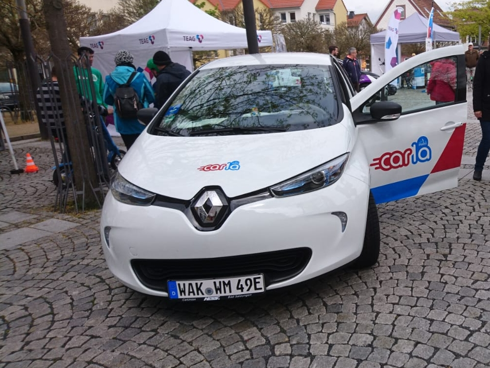 Renault Zoey als Fahrzeug des carla-Projekts